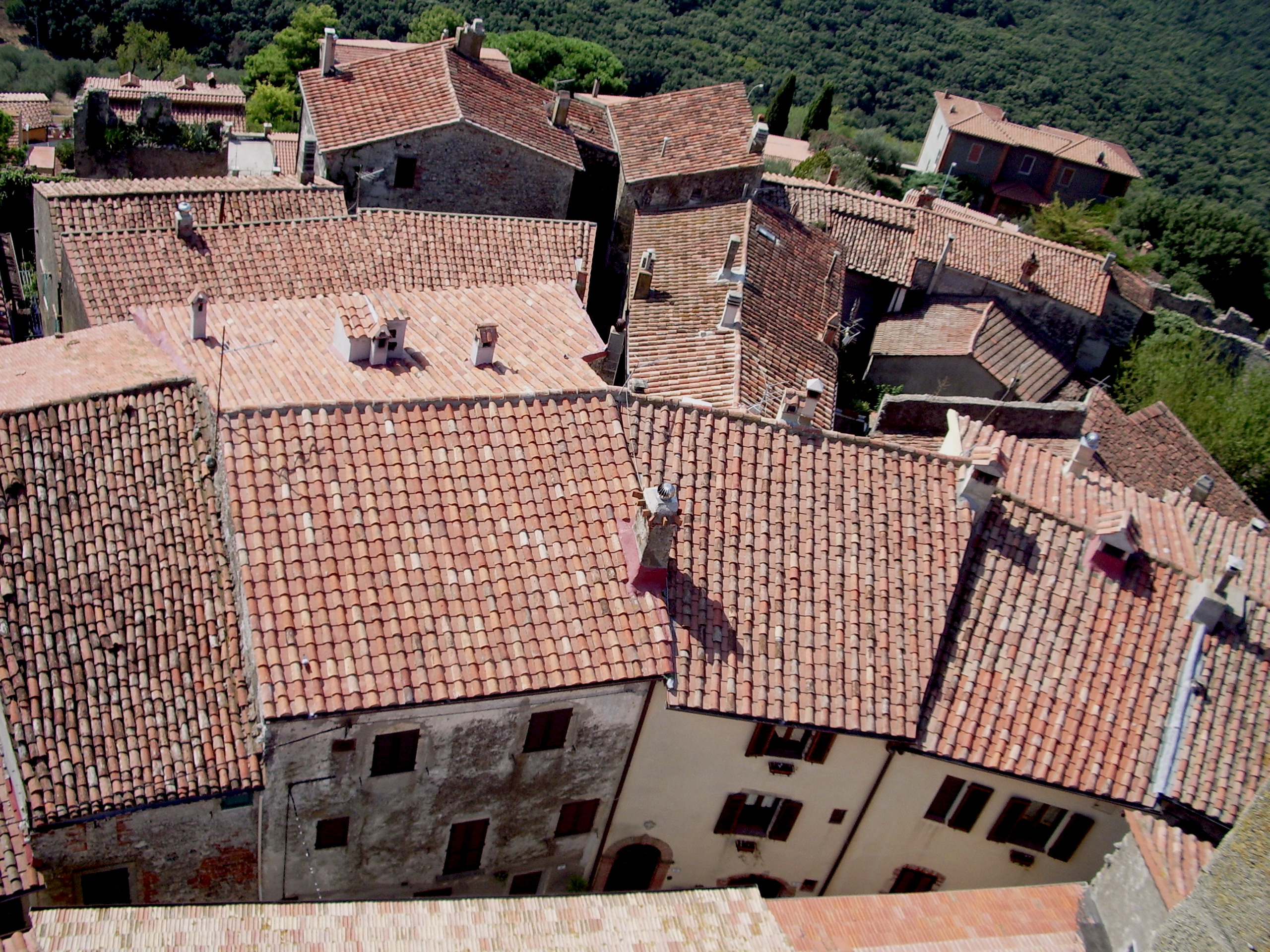 Tetti del centro storico di Capalbio visti dalla torre della Rocca Aldobrandesca